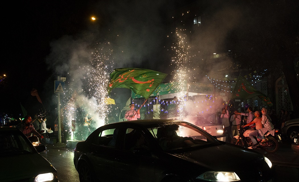 جشن عید غدیر خم شیعیان در تهران مرداد 1399